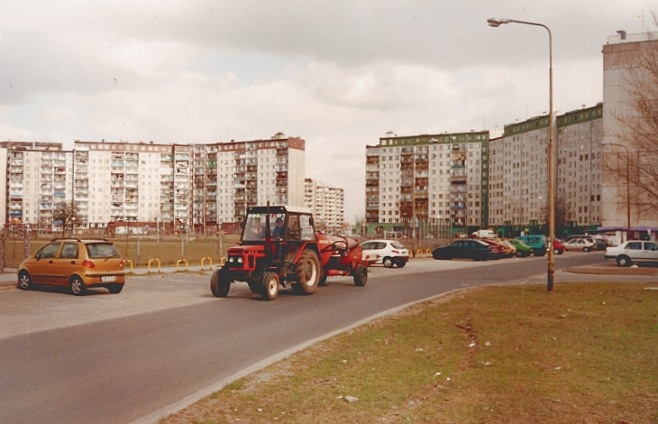 Wrocław, Gaj building estate